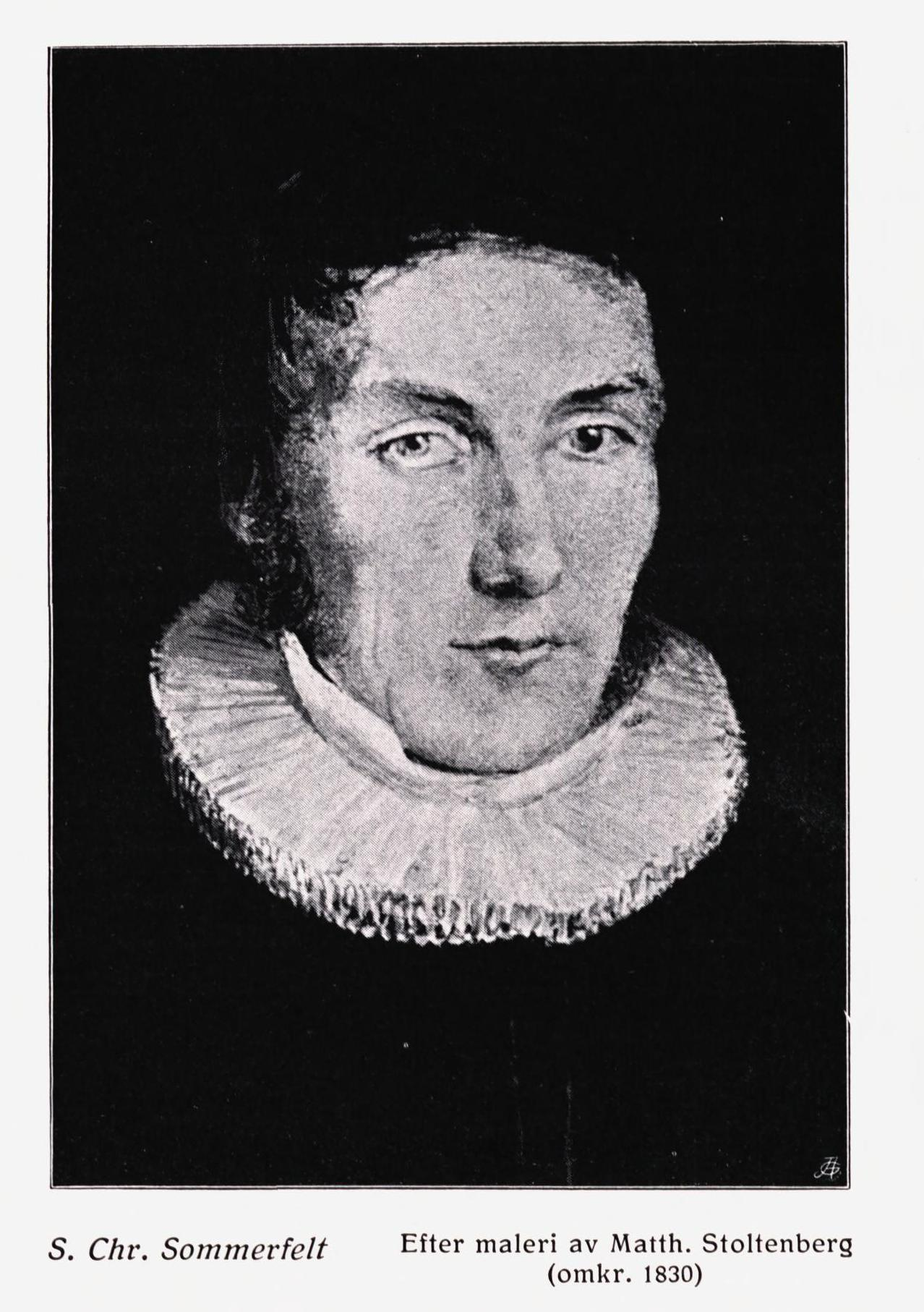 Illustrasjon hentet fra boken "Norge 1814-1914" av og utgitt av Cammermeyer Kristiania : Cammermeyer, 1914 (Kristiania, 1914)